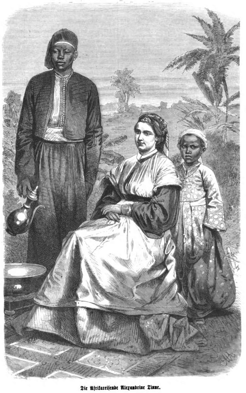 Alexandrine Tinné, 1869.